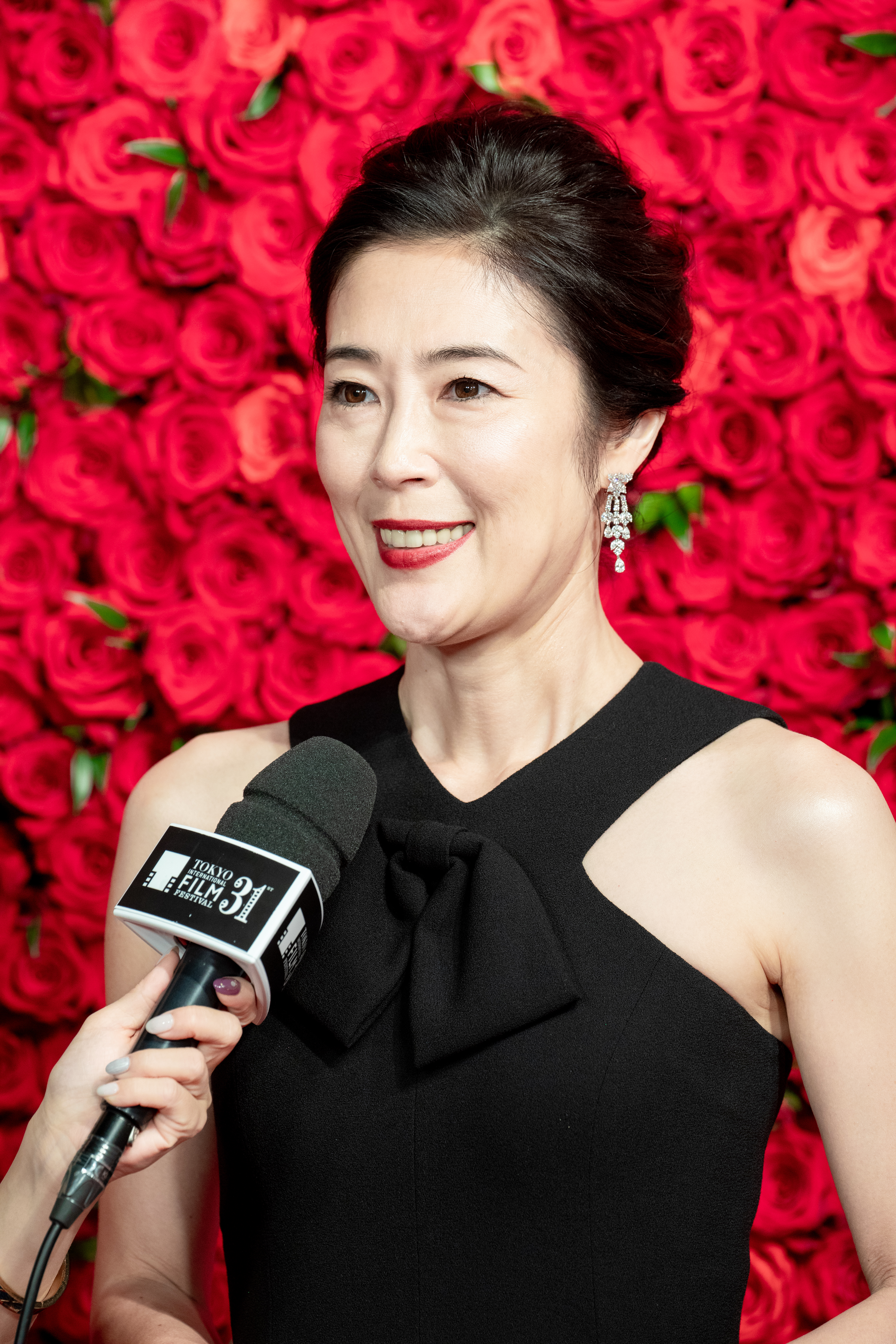 第30回 東京国際映画祭 オープニングセレモニー 寺島しのぶ (アリー/スター誕生)